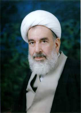 مرحوم آیت الله حاج شیخ حسن صافی اصفهانی